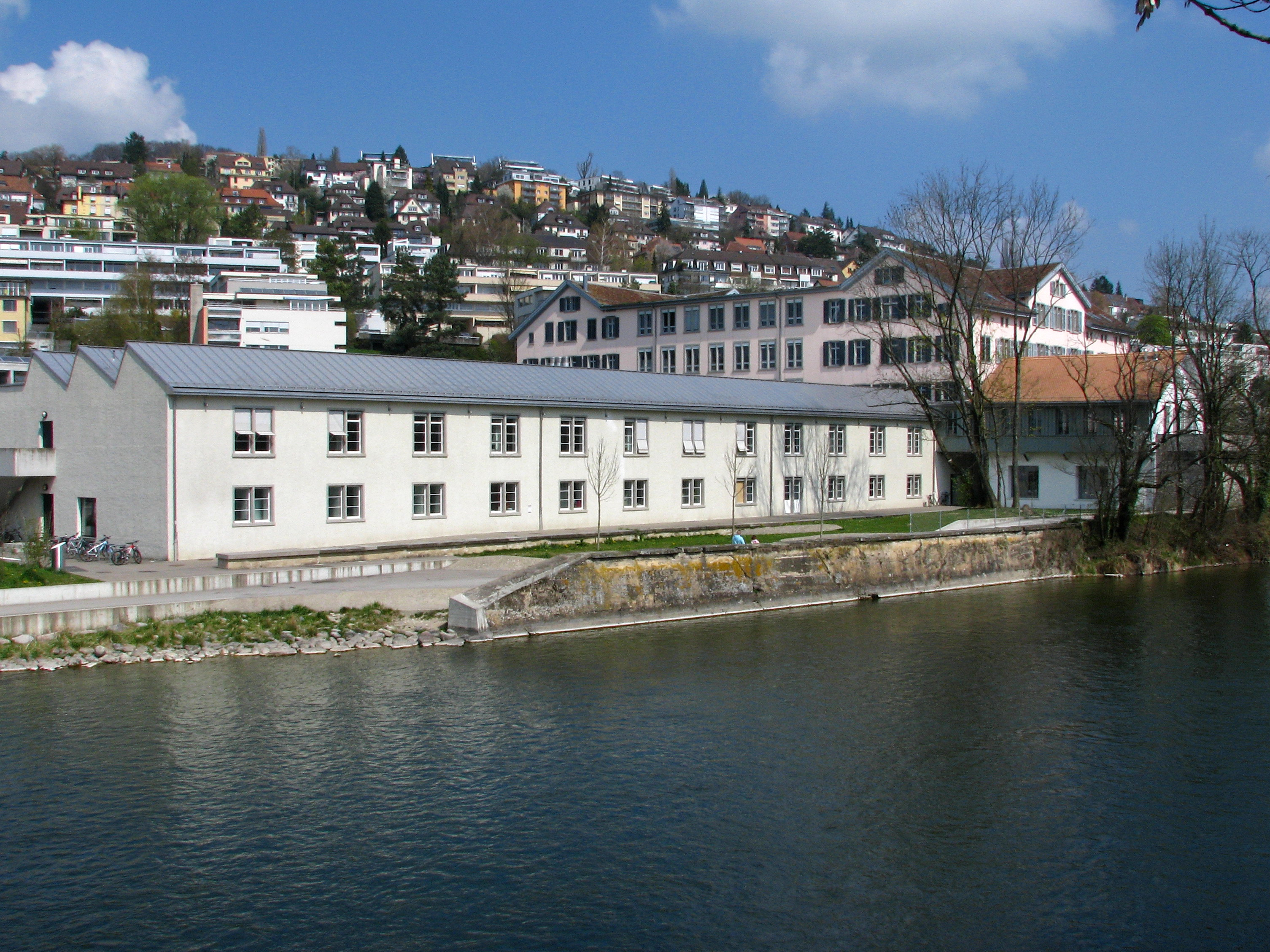 Limmat in Zürich-Wipkingen